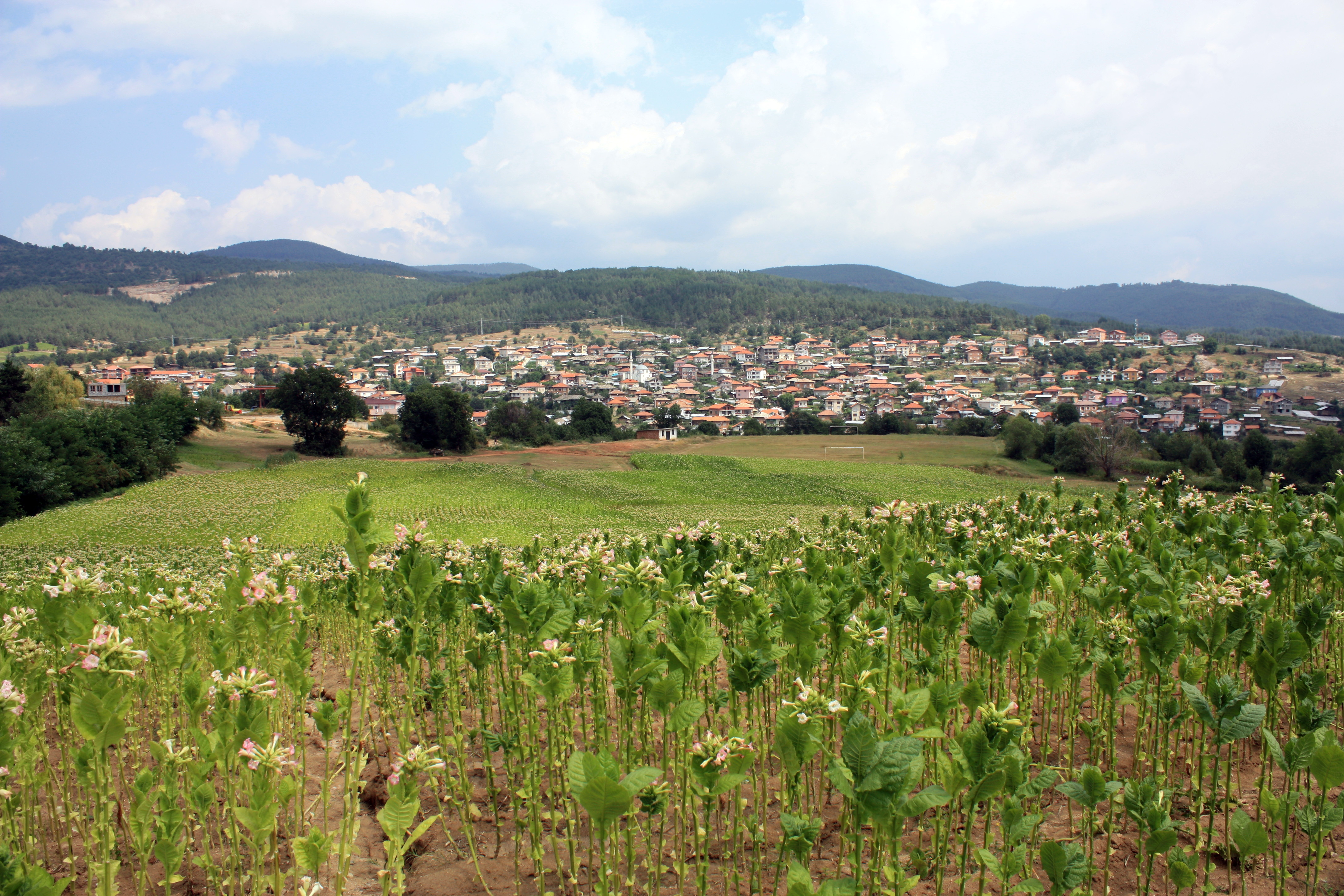 Blick über Tabakfeld auf das Dorf "Dolno Drjanowo". Blickrichtnug Norden.